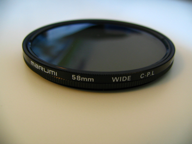 autore: mestesso